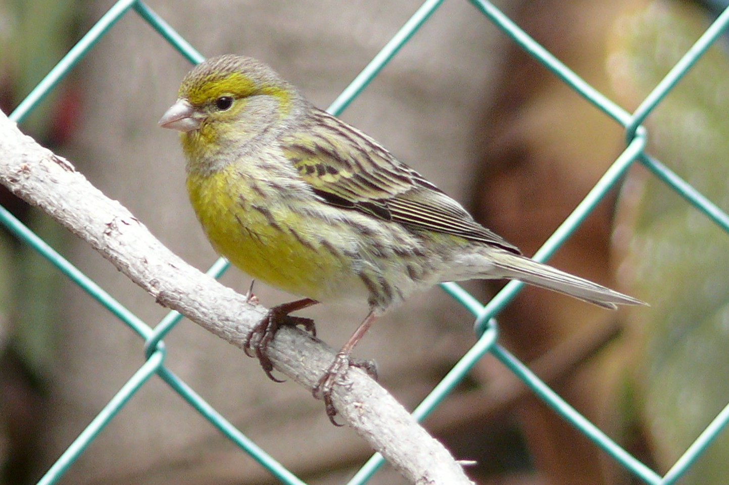 Kanarienvogel (Serinus canaria), Wildform auf La Palma